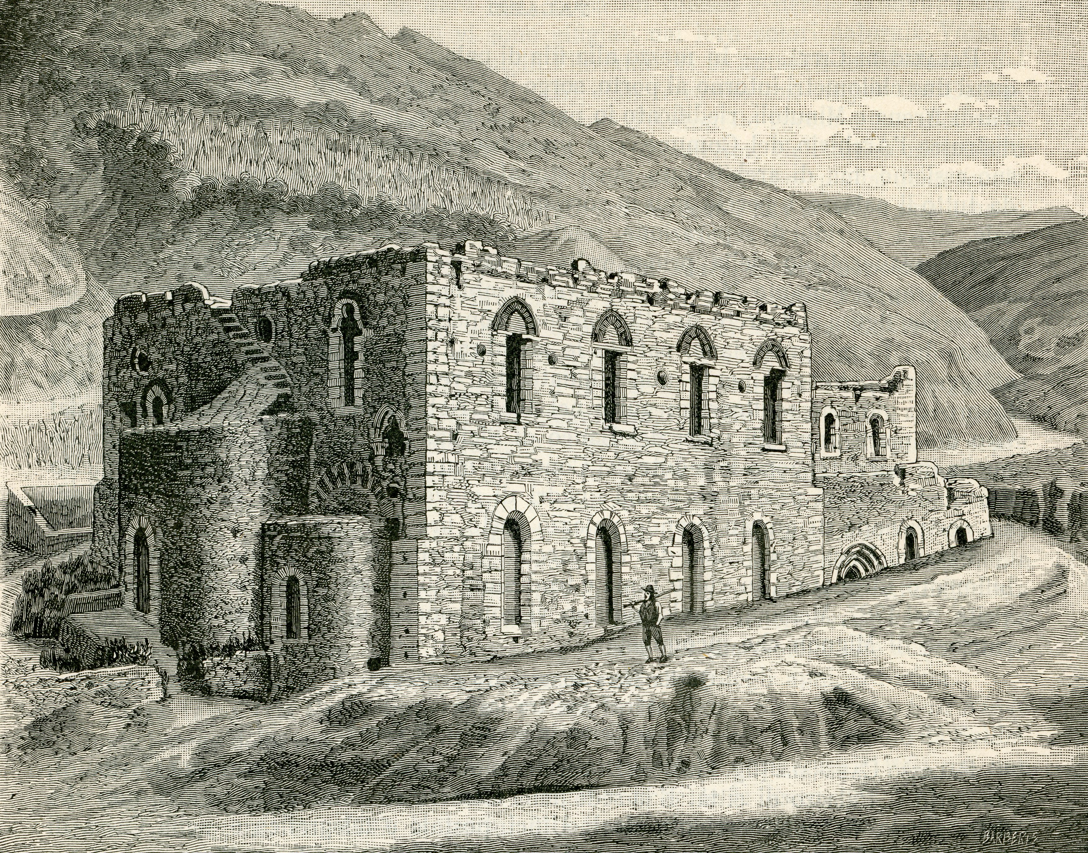 Messina: chiesa di Santa Maria della Valle detta la Badiazza (xilografia di Barberis 1892).